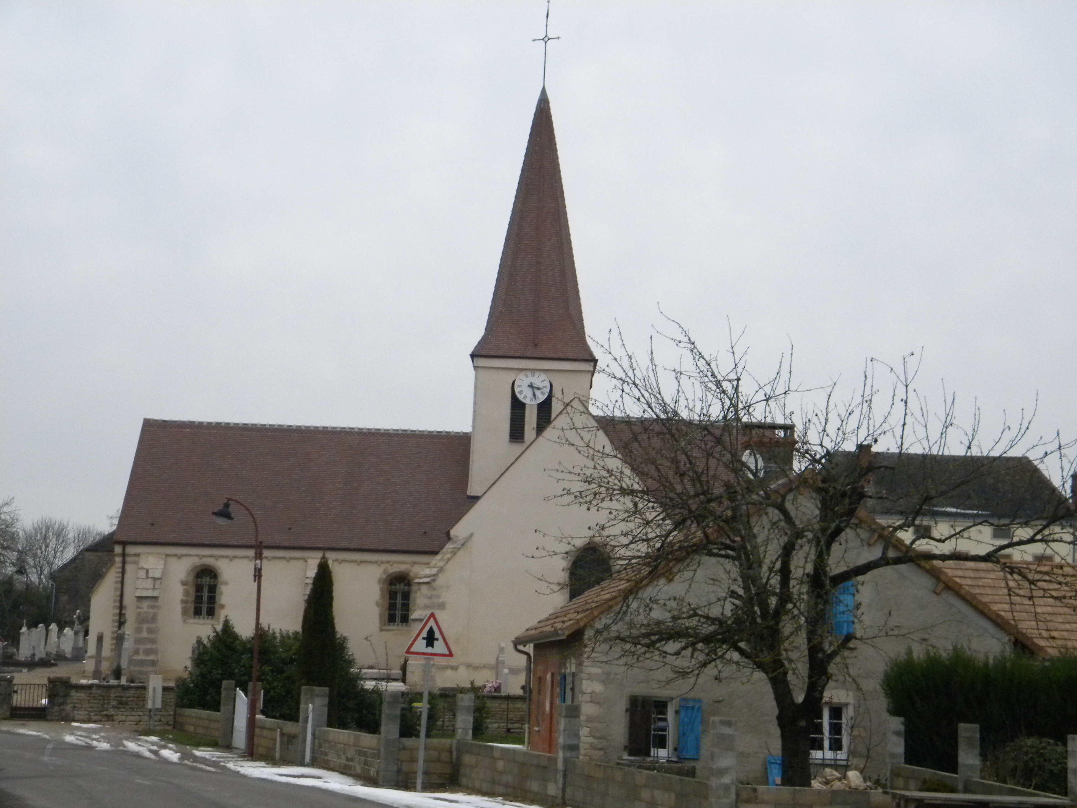 kirko de Corberon